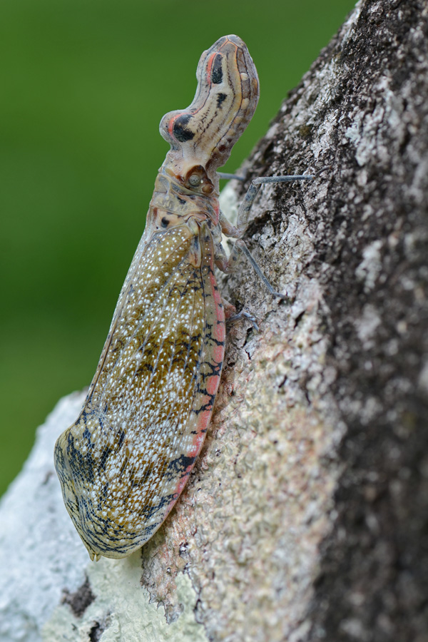 Los Amigos Conservation Concession, Madre de Dios, Peru